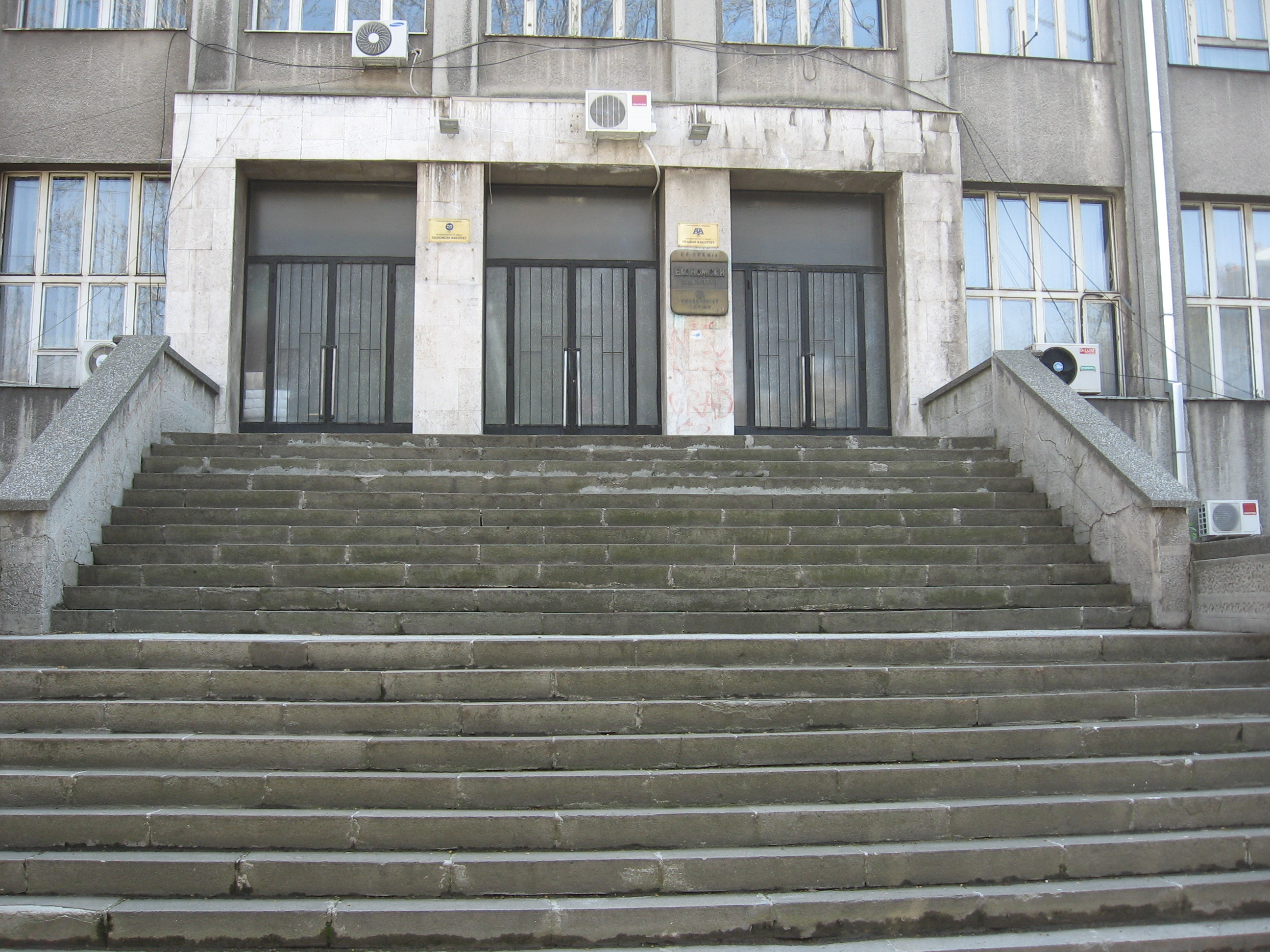 Ulaz na Pravnom i Ekonomskom fakultetu u Nisu. Snimljeno april 2010.